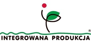 Integrated Pest Management - Poland